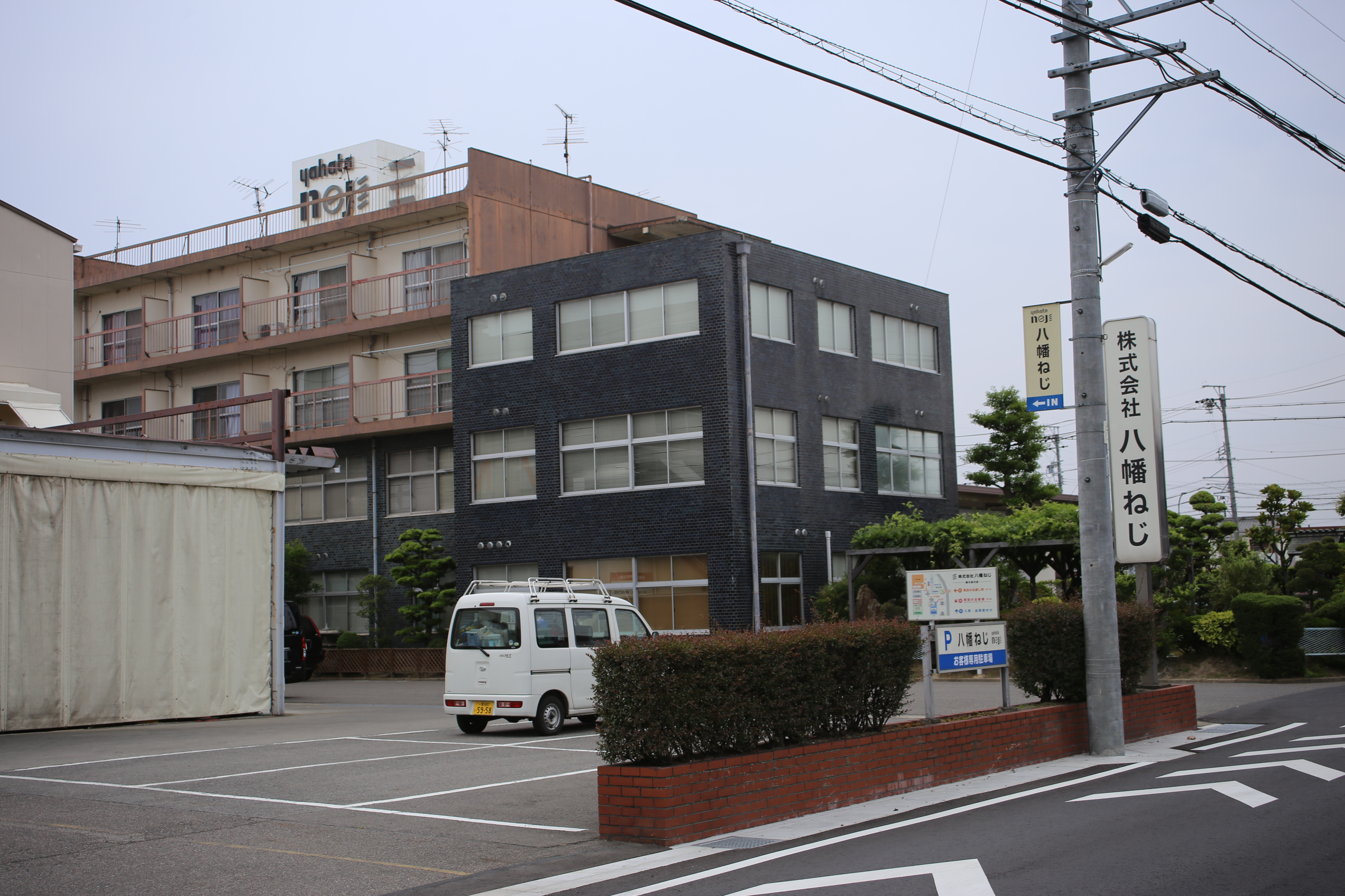 愛知県北名古屋市山之腰天神東の八幡ねじ本社を東側公道南側より撮影